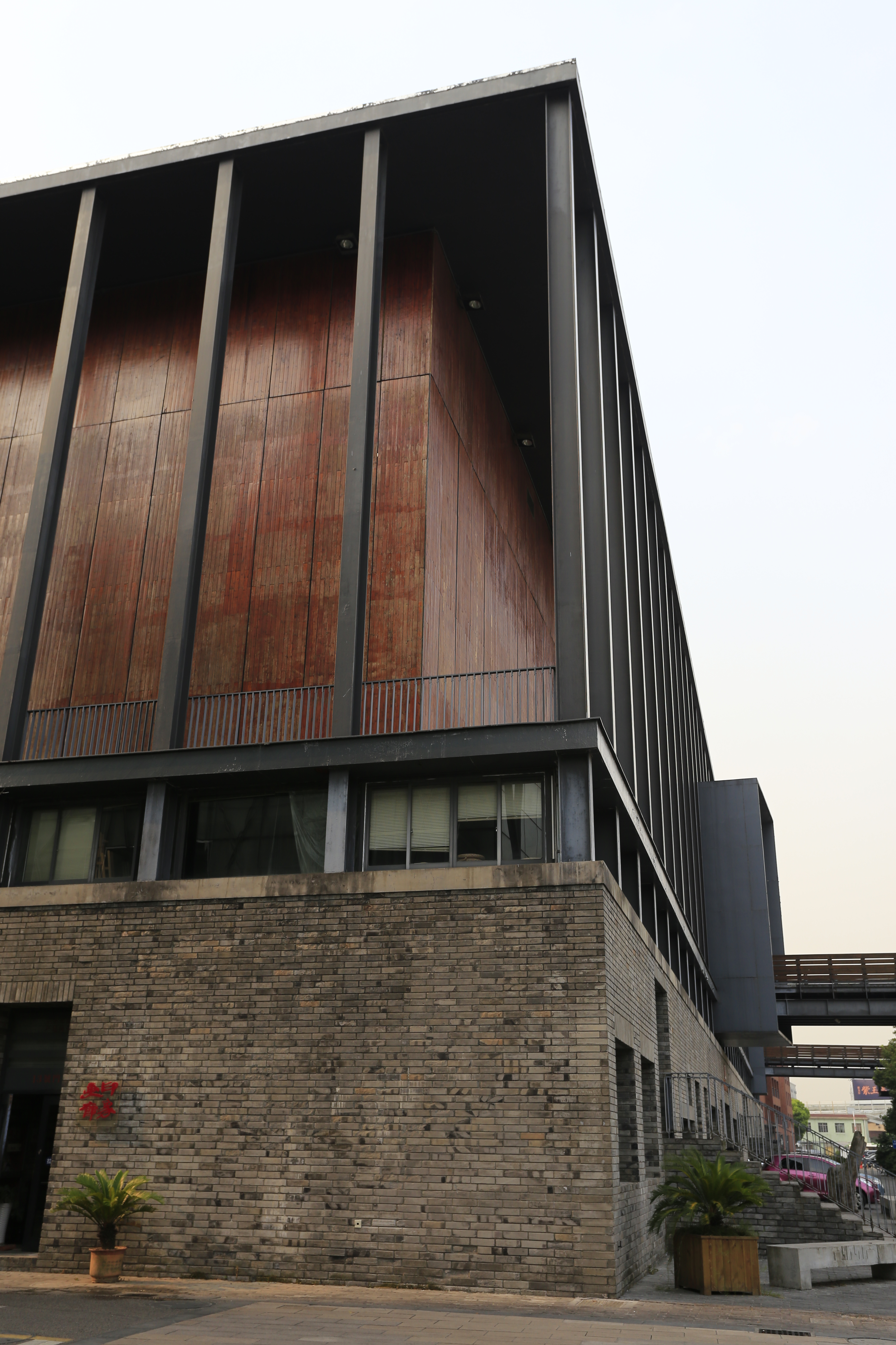 宁波美术馆